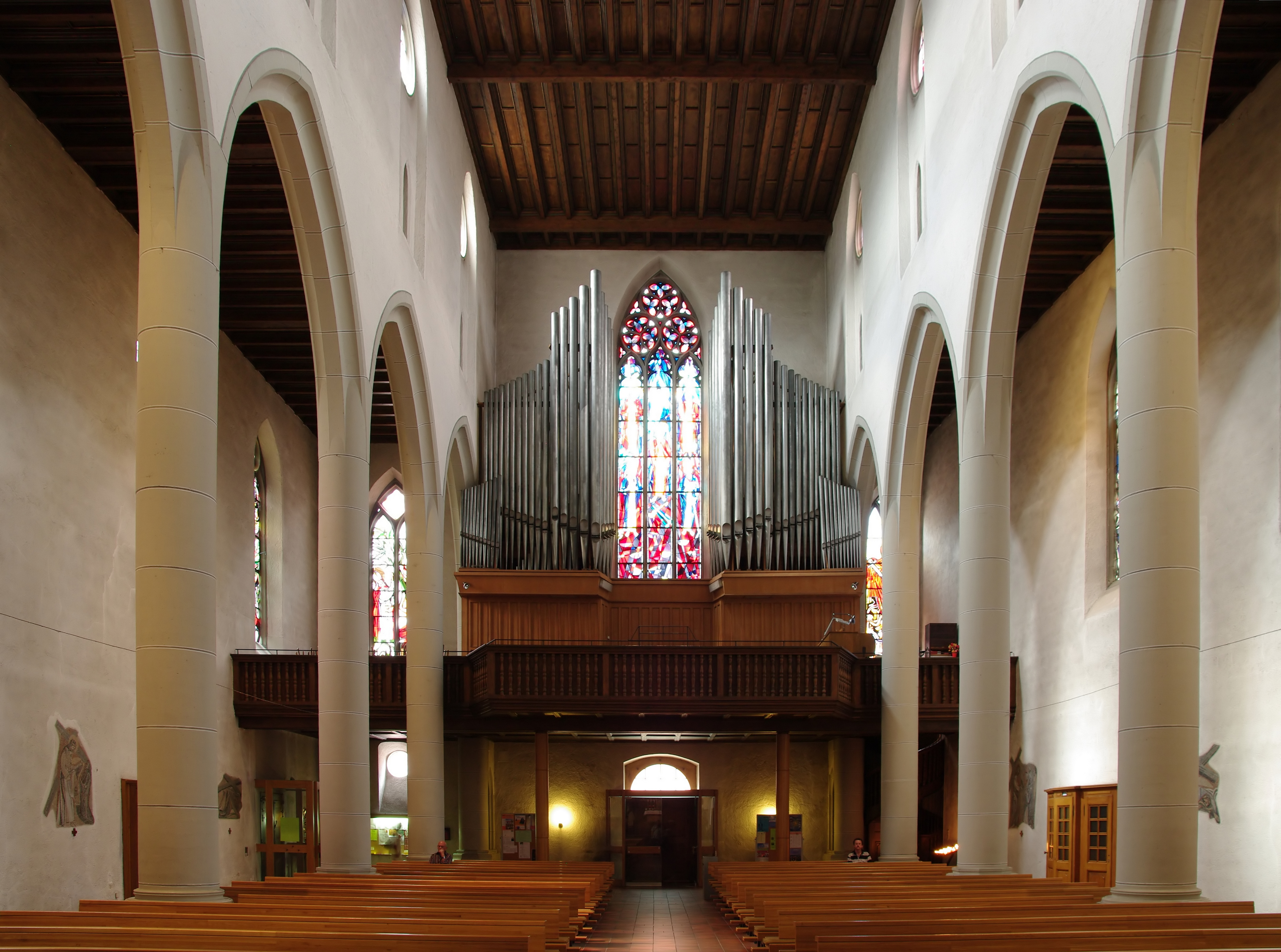 St.Martin in der Innenstadt Orgel